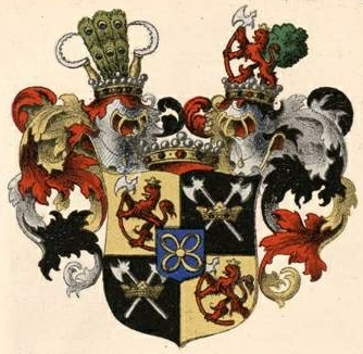 Uexküll-Güldenbandi suguvõsa vabahärravapp